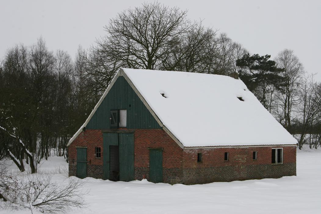 Huisje van Uniken, Zwartemeer. Foto: Chris Kuhl c.kuhl(1at)xs4all.nl